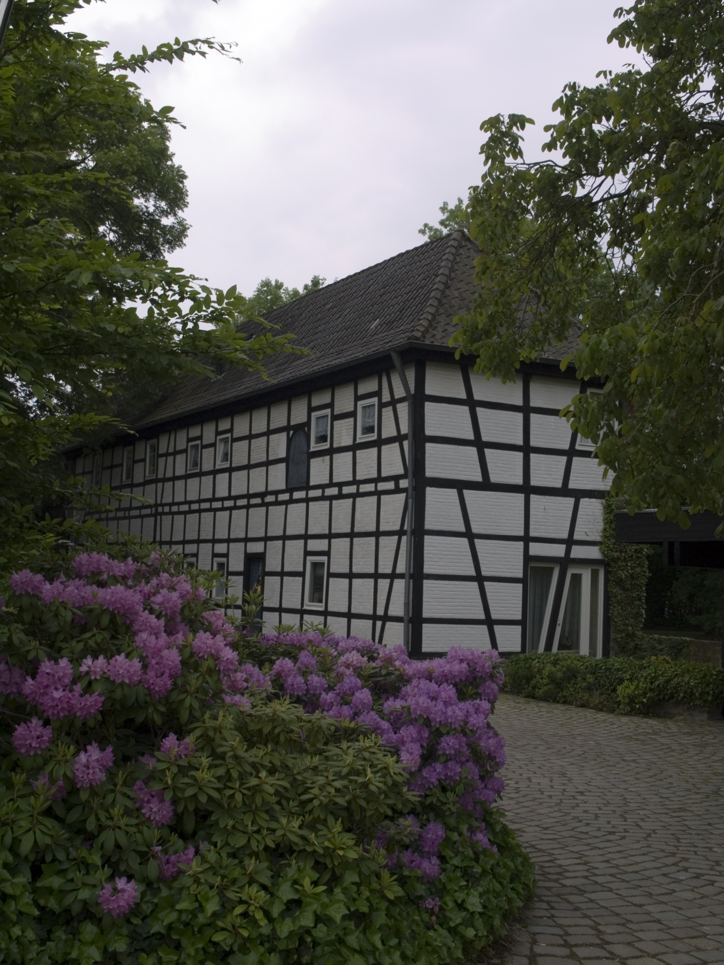 Северный Рейн-Вестфалия, Ратинген - Замок Хауз